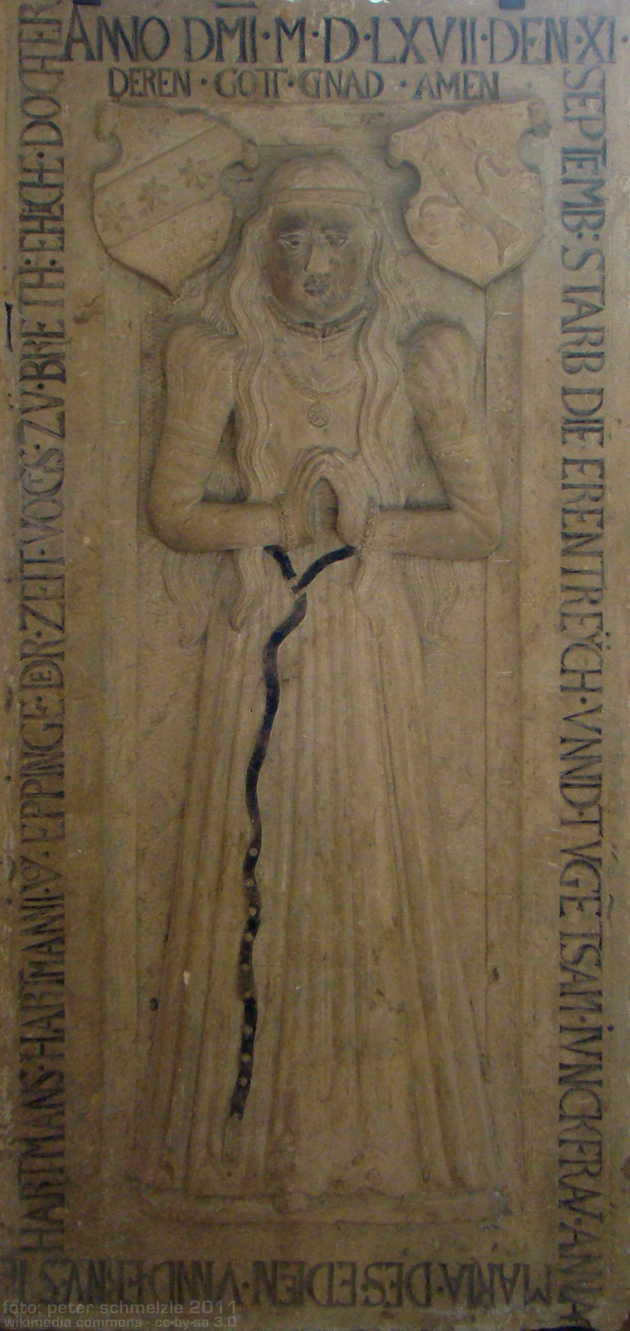 Hartmanni-Grabplatte in der Stiftskirche Bretten, Anna Maria Hartmanni († 1567), Tochter des Hartmannus Hartmanni d. J., mit Allianzwappen Hartmanni / ?, wiederholt auf dem Medaillon der Figur